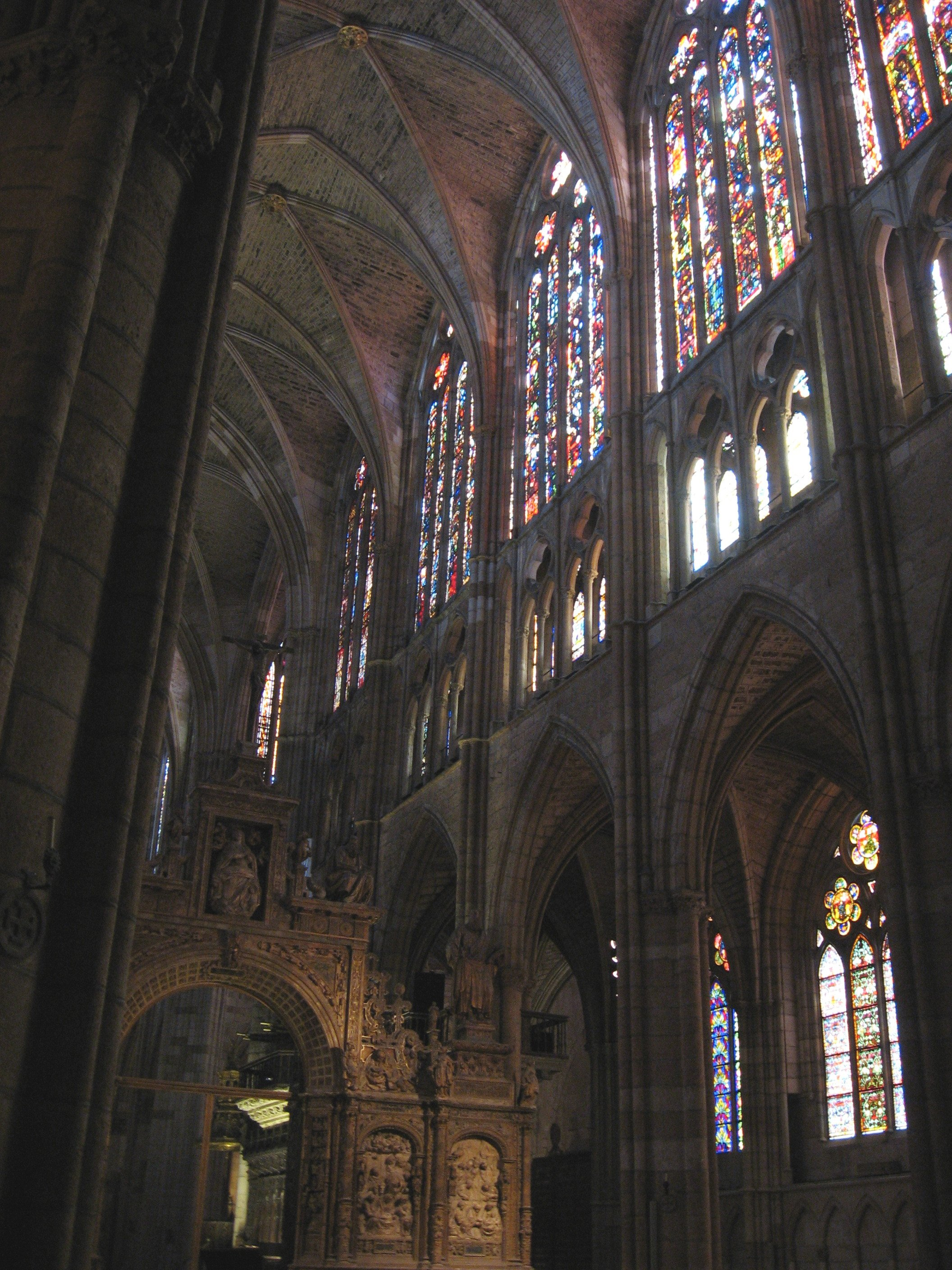 Desc: Interior de la Catedral de León